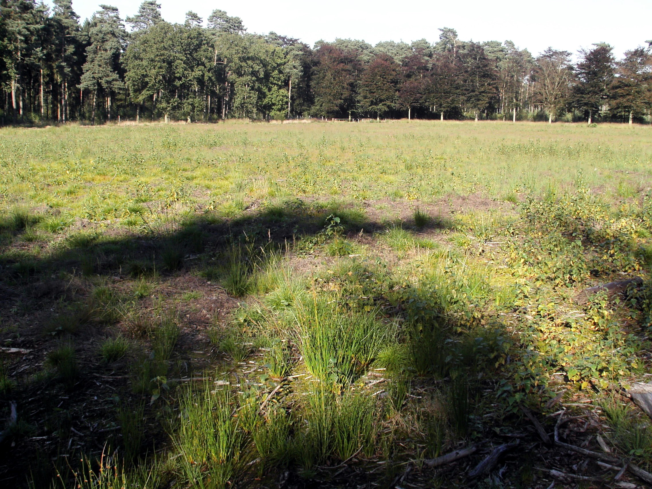 Description Nieuwe Heide, De Inslag, Brasschaat (Antwerpen)Date 18 September 2005Source Own workAuthor Johan Neegers Nieuwe Heide, De Inslag, Brasschaat (Antwerpen)